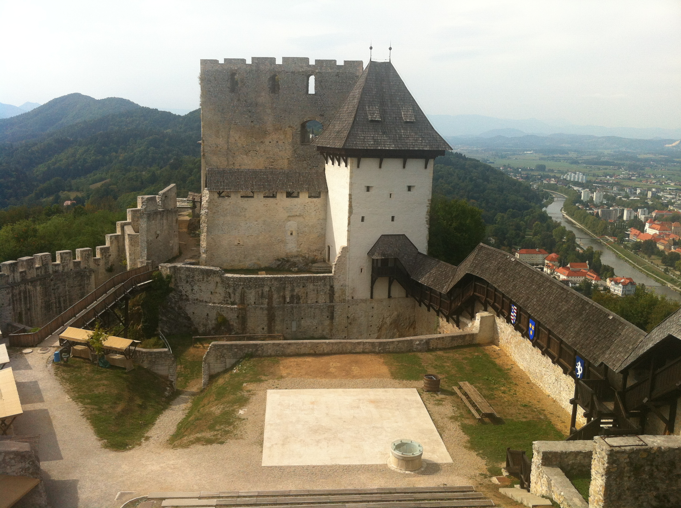 Castle Celje